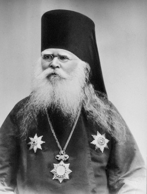 Иероним (Экземплярский), архиеп. Литовский. Фотография. Кон. XIX в. (РГИА)